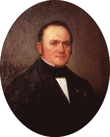 Juvénal Viellard (1803-1886)